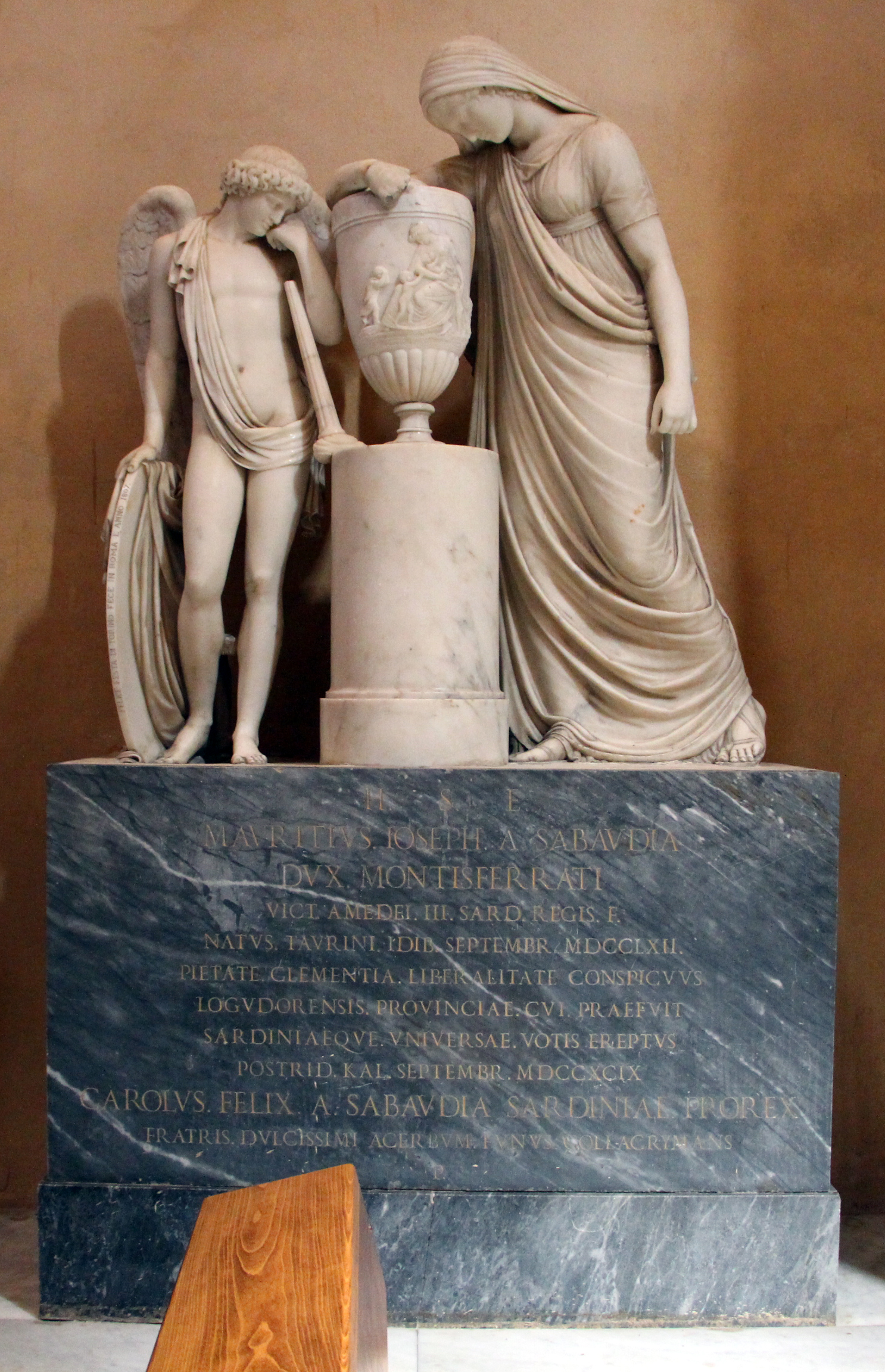 chiese di Alghero, Italia